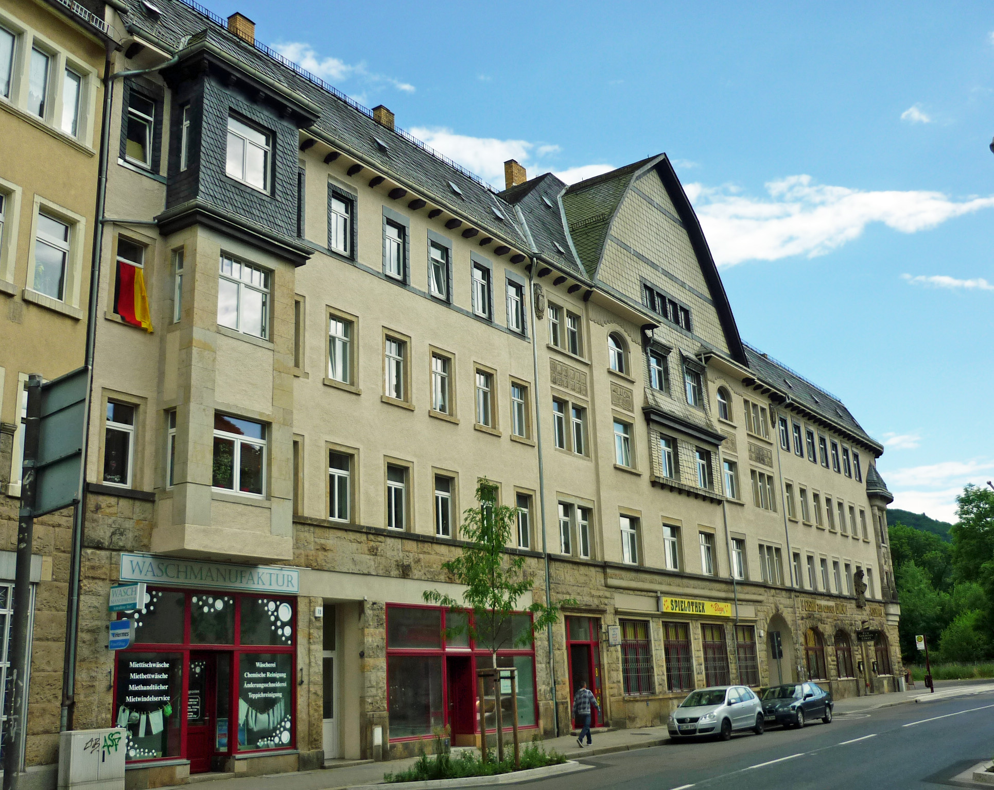 Dresdner Str. 79/81/83 in Freital-Potschappel